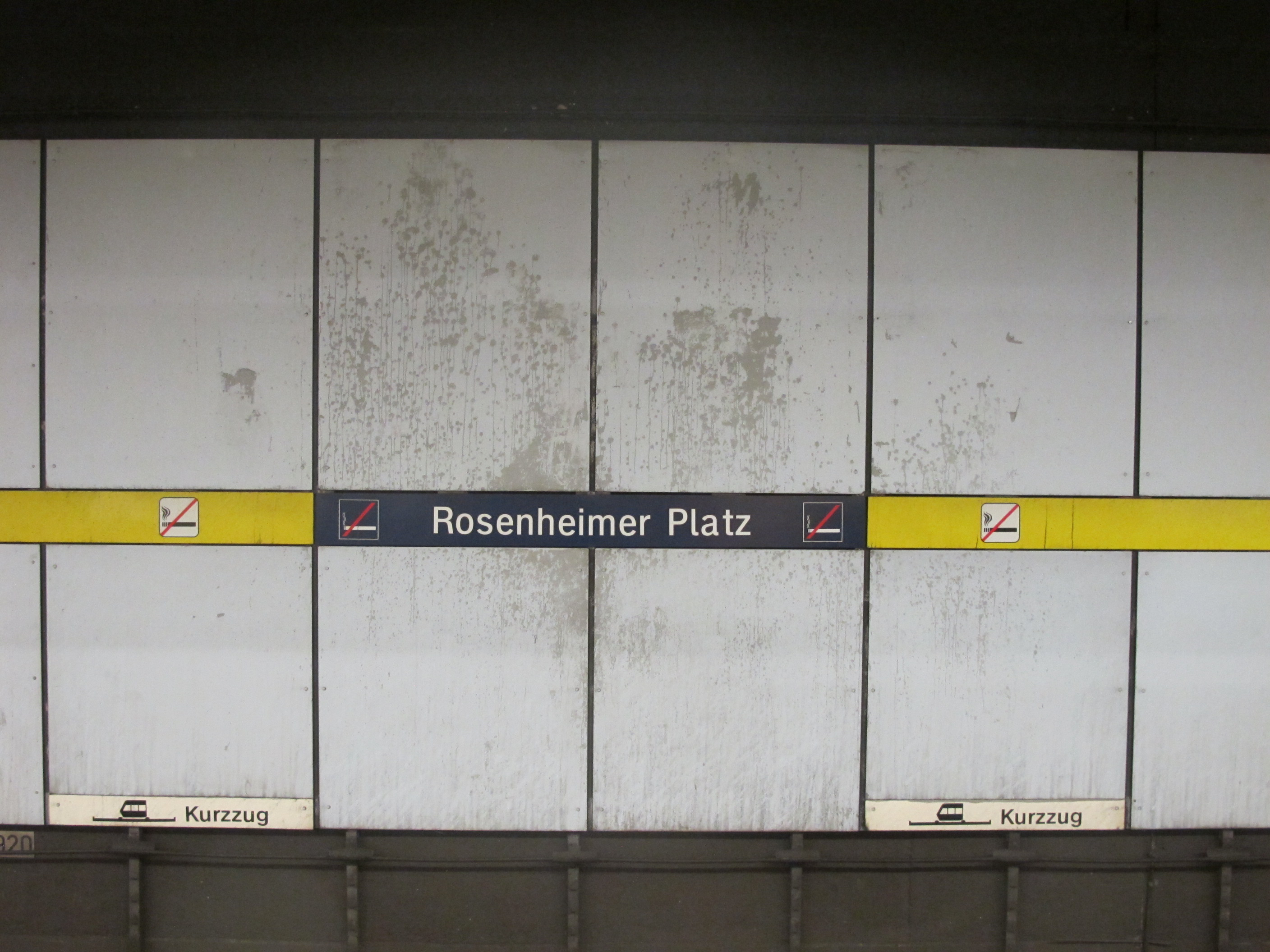 Bahnhof München Rosenheimer Platz